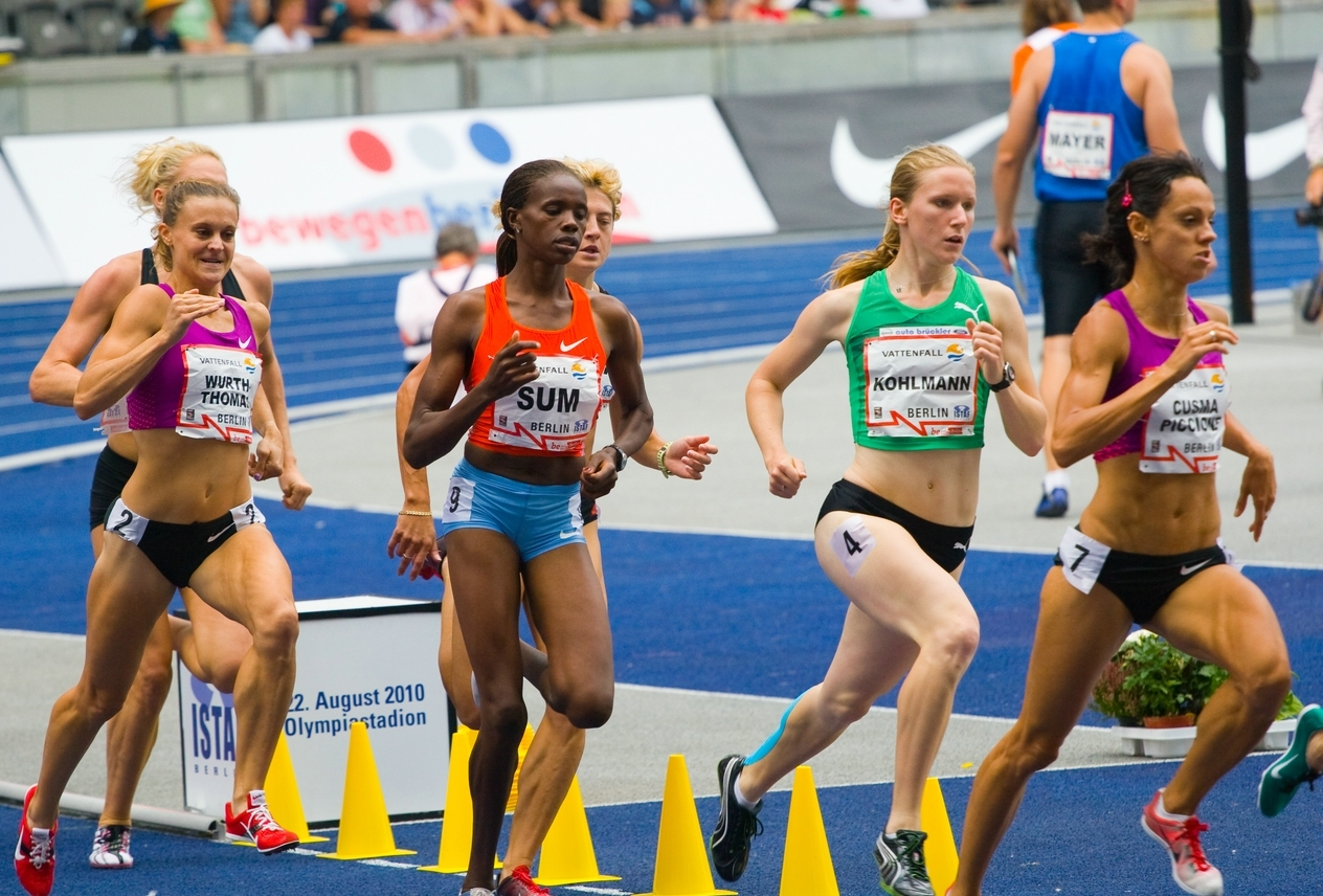 800m Frauen (Christin Wurth-Thomas, Eunice Sum, Fabienne Kohlmann, Elisa Cusma)